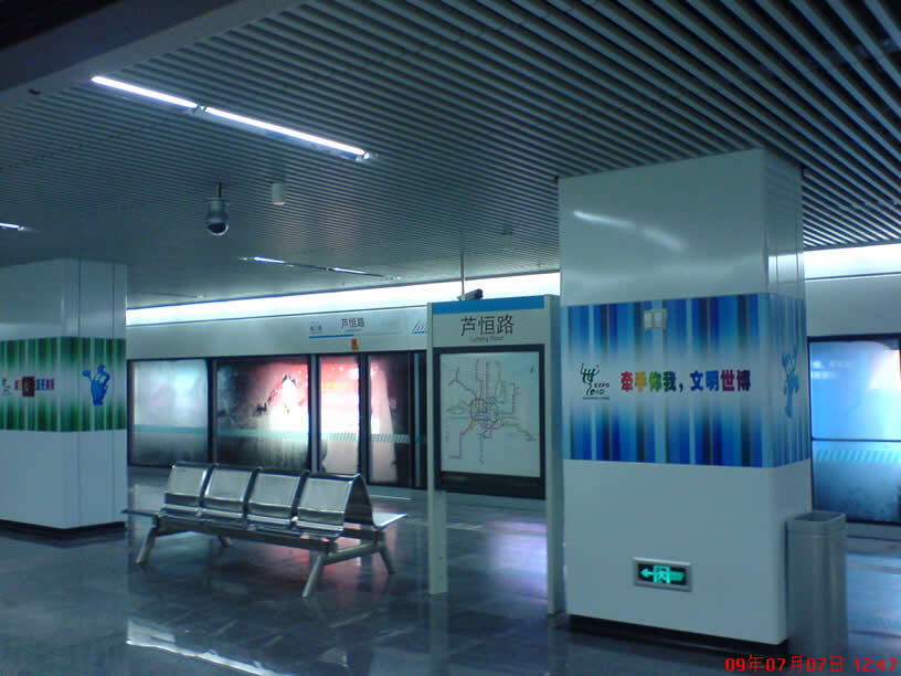 芦恒路站站台